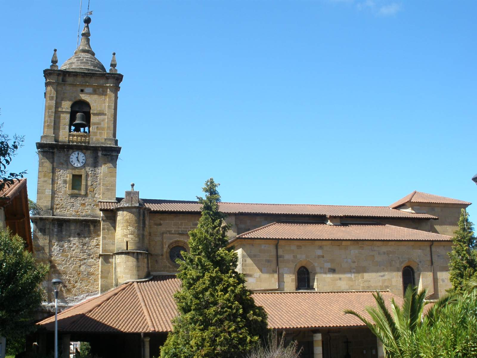 Iglesia de Santa María, en Lezama (Bizkaia)